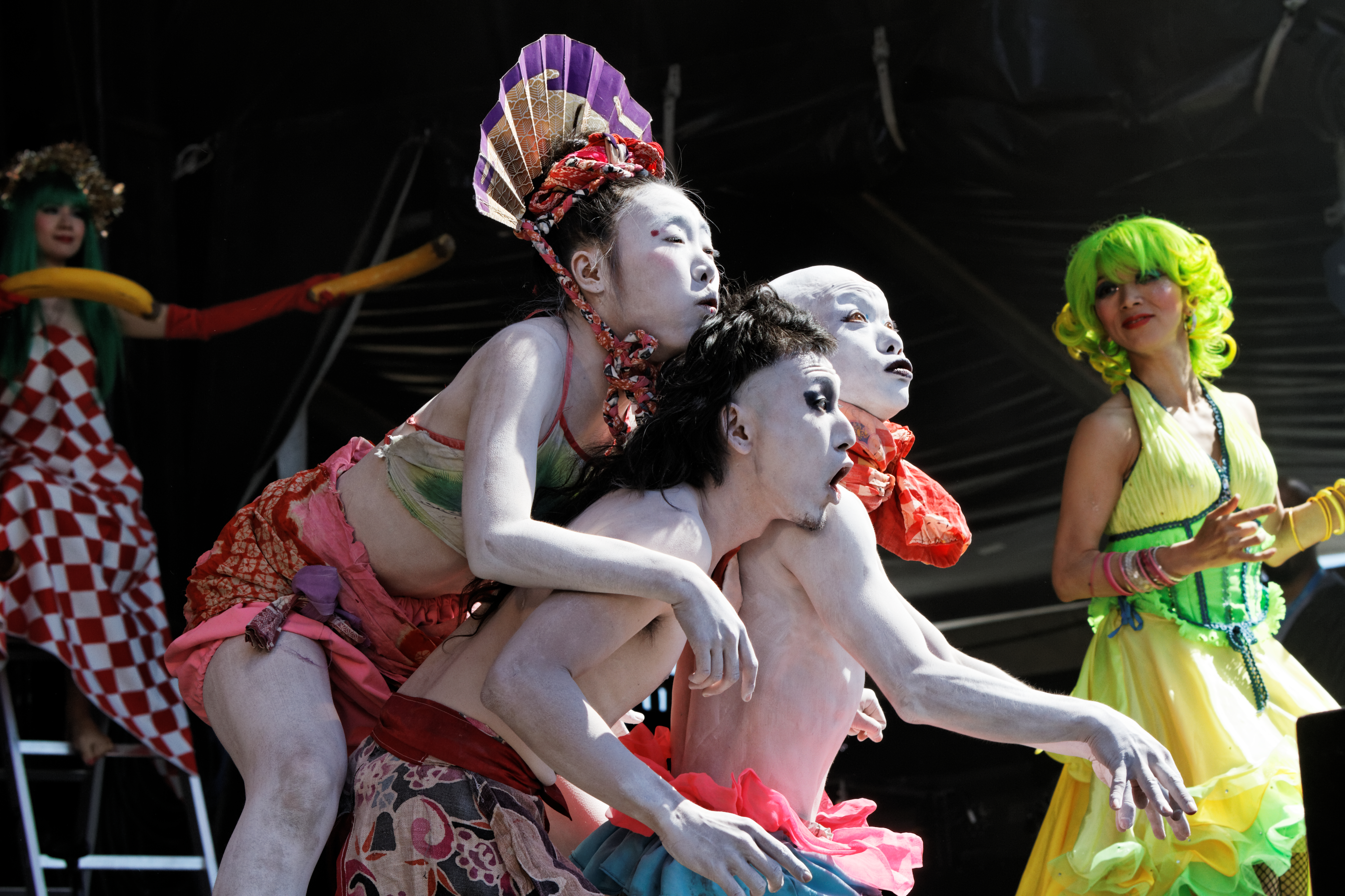 Le Shibusa Shirazu Orchestra en concert sur la scène Landaoudec lors du festival du bout du Monde à Crozon dans le Finistère (France).